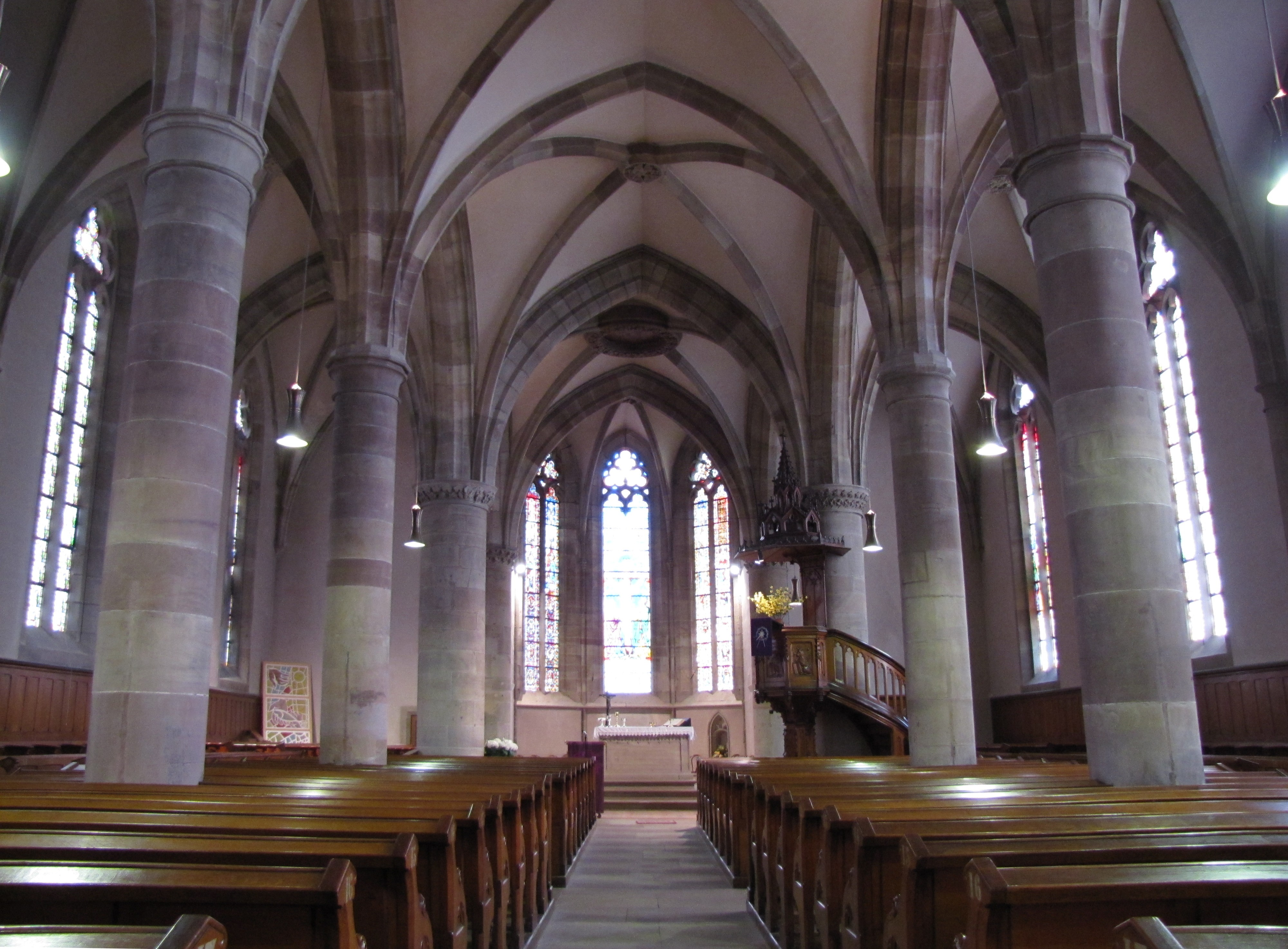 Alsace, Bas-Rhin, Westhoffen, Église protestante Saint-Martin (PA00085223, IA67006260): Vue intérieure de la nef vers le chœur.